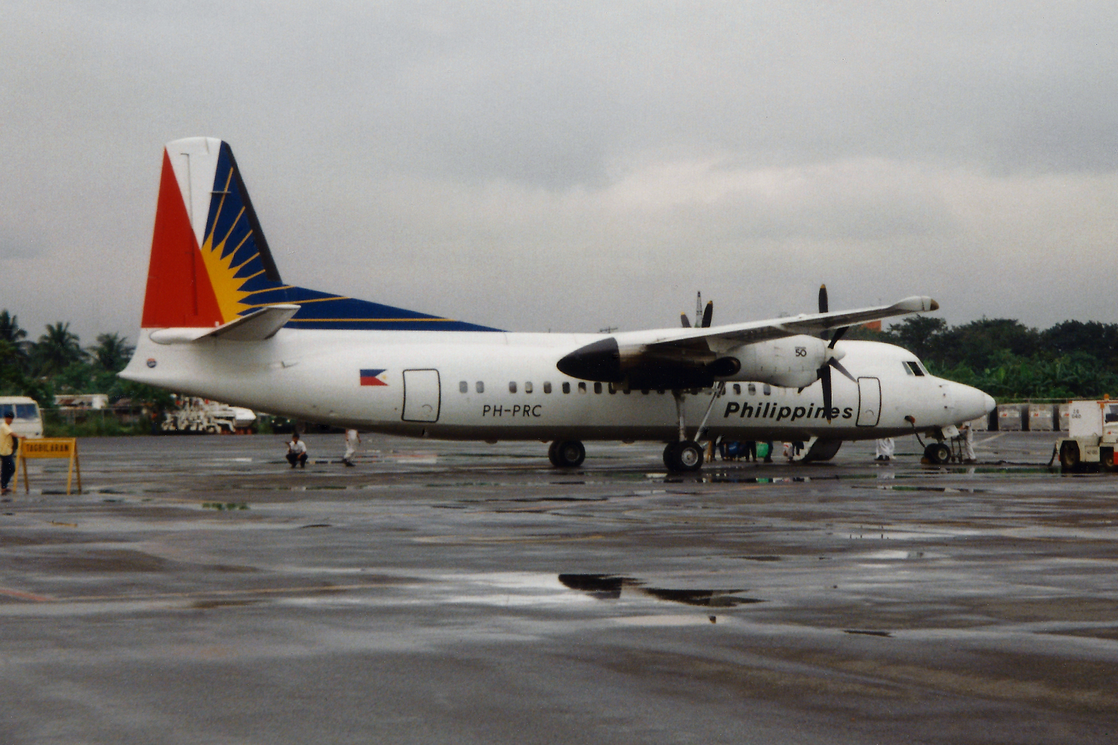 Tagbilaran (TAG / RPVT), Philippine 2.1994